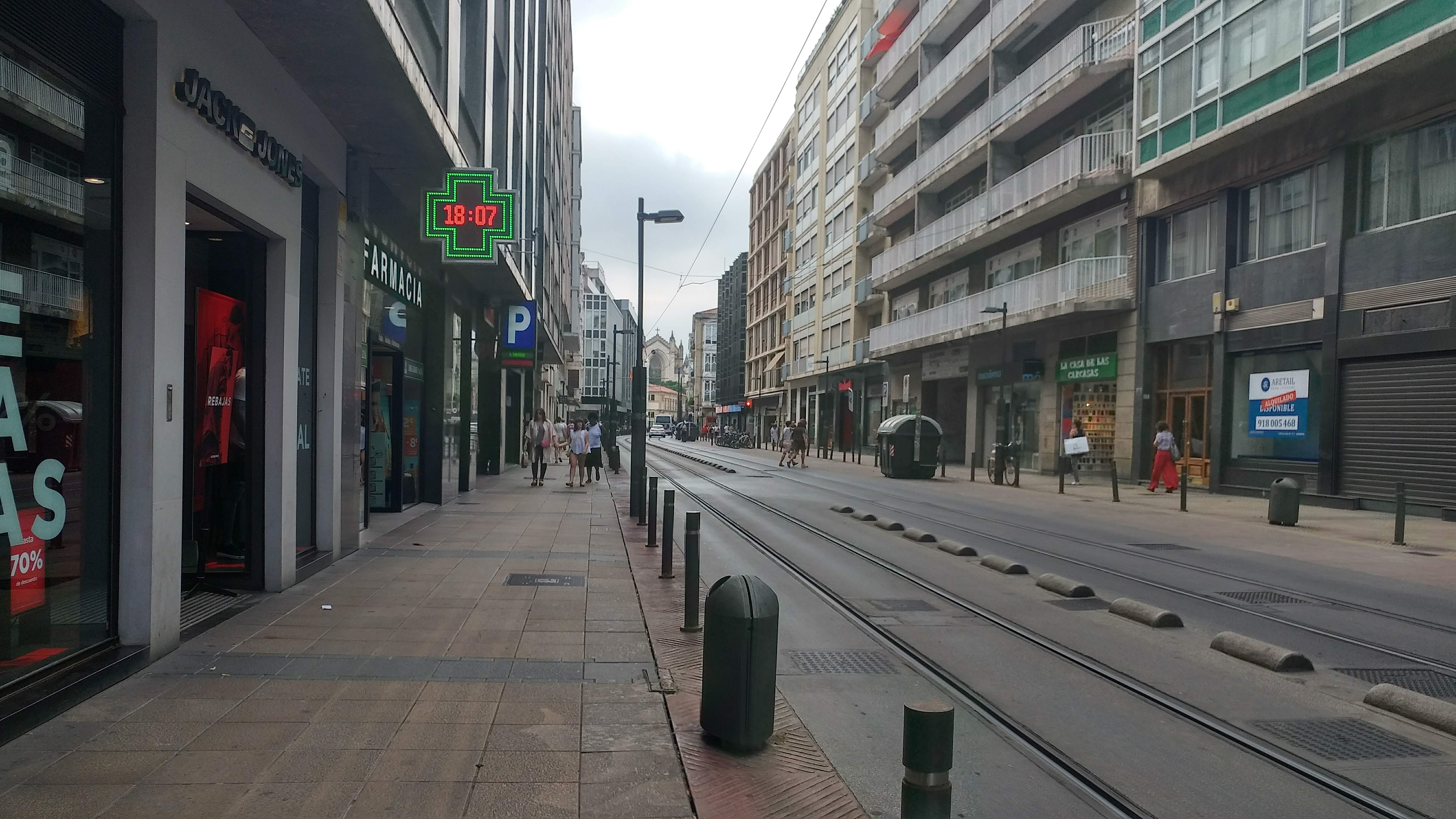 Gasteizko Alaba Jeneralaren kalea